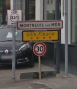 Un panneau fantaisiste à l'entrée de la commune